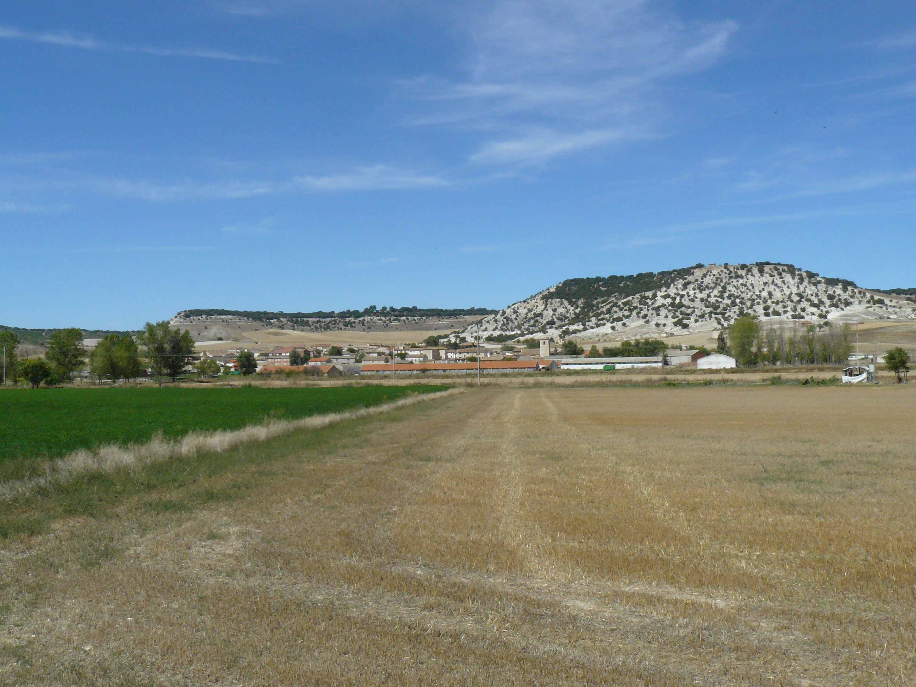 Villanueva de los Infantes, Valladolid.